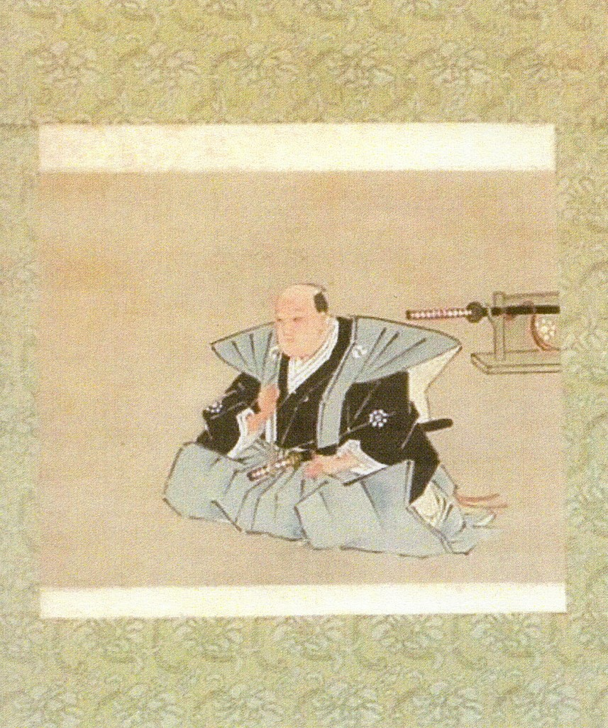 伊勢菰野藩9代藩主・土方義苗の肖像画。